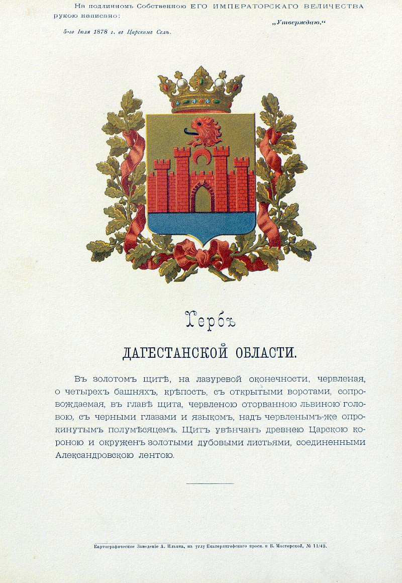 Official Russian Empire coat of arms Dagestan Oblast. Герб Российской Империи Дагестанской области с официальным описанием в Гербовнике Бенке. Утверждён Императором Всероссийским Александром Вторым в 1878 году.